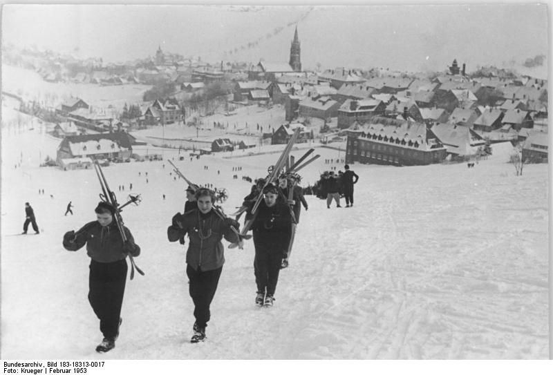 Zentralbild Krueger 9.2.1953 IV. Wintersportmeisterschaften der Deutschen Demokratischen Republik vom 6. bis 8.2.1953 in Oberwiesenthal Beim Aufstieg zur Schanze.